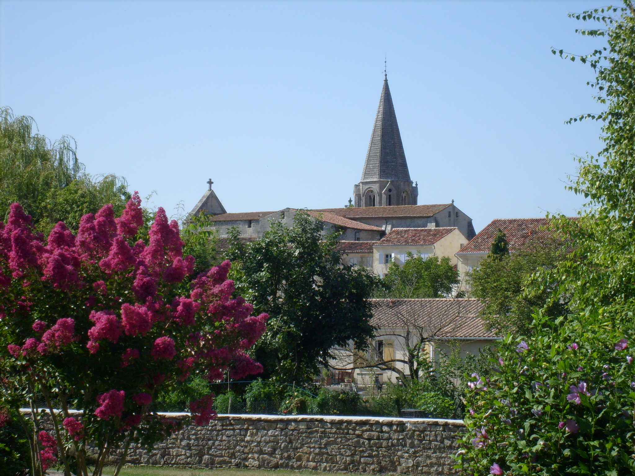 Une vue de Gémozac (Charente-Maritime)